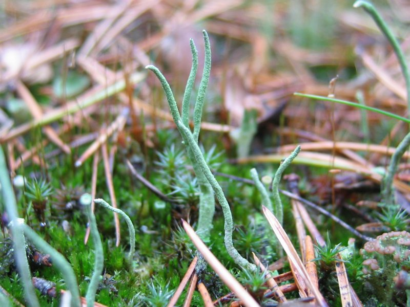 Pfriemen-Becherflechte Cladonia subulata